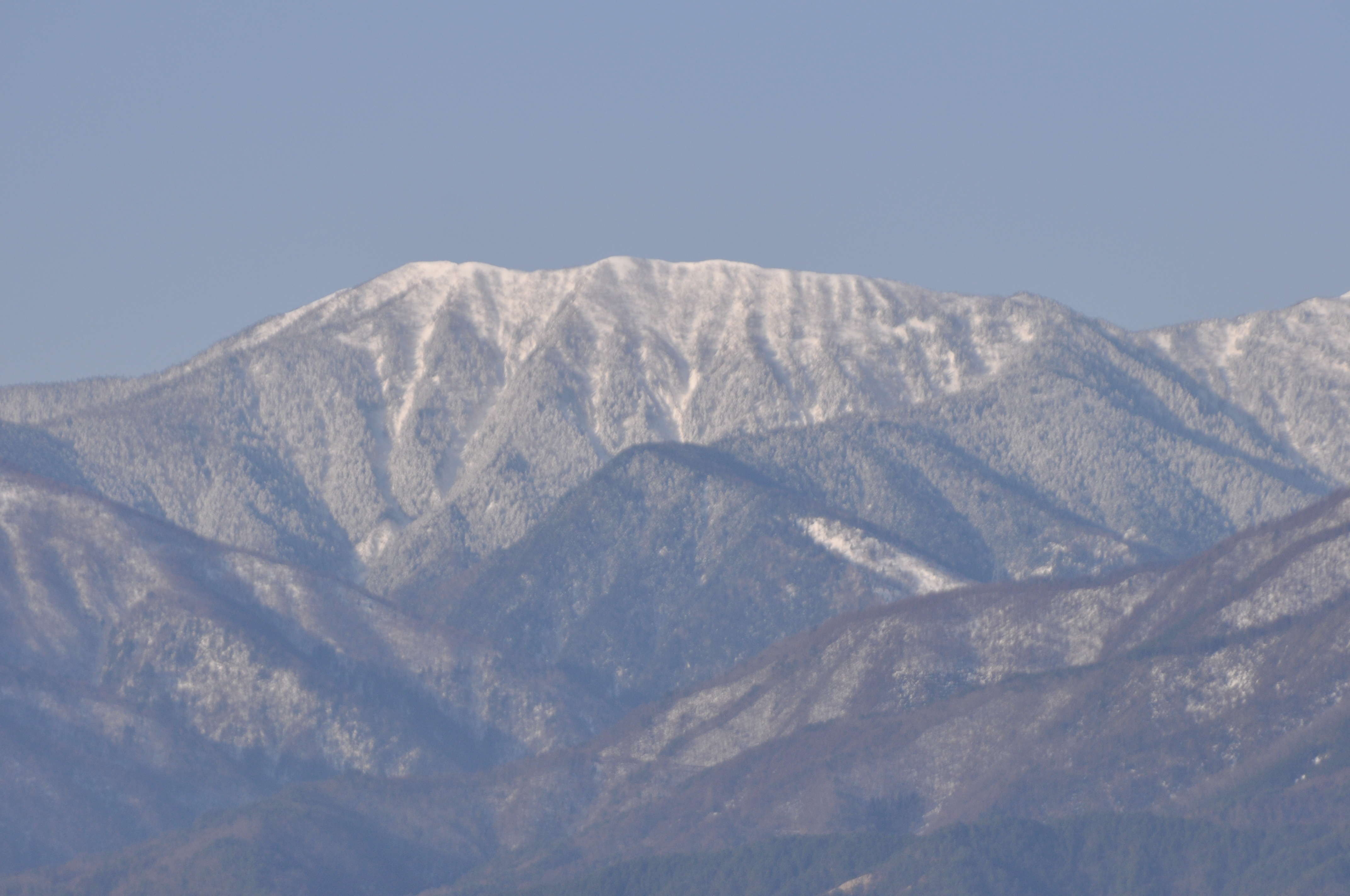 池田町中鵜から見る大滝山・2009年3月撮影